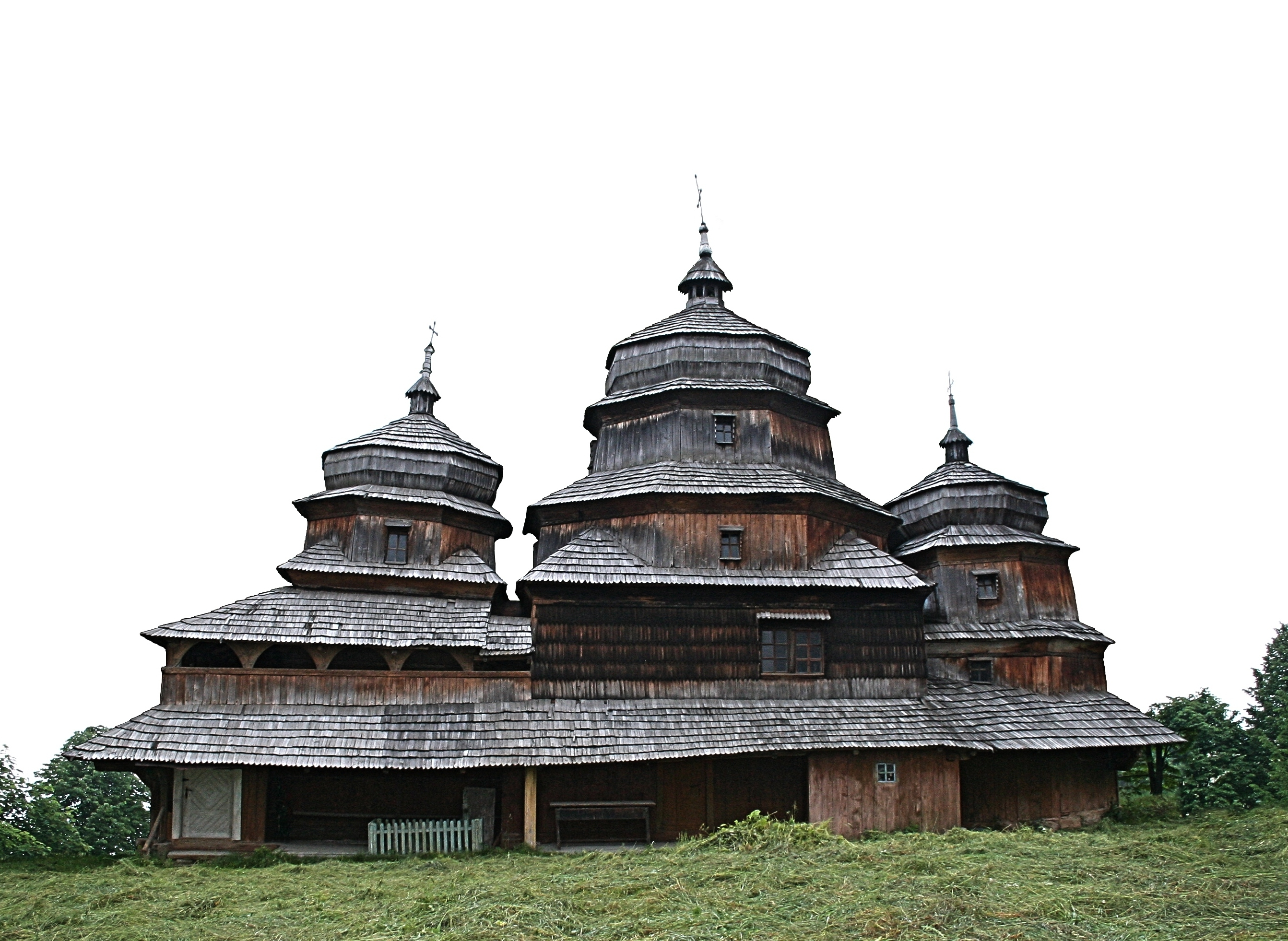 Михайлiвська ц-ва